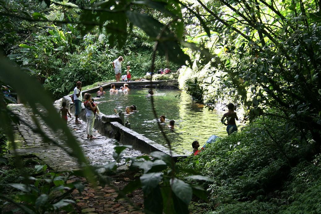 Je suis l'auteur de cette photo. Les Bains jaunes - Basse Terre - Guadeloupe - Aout 2006 les bains jaunes sont situés sur le territoire de la commune de saint-claude et non pas basse-terre